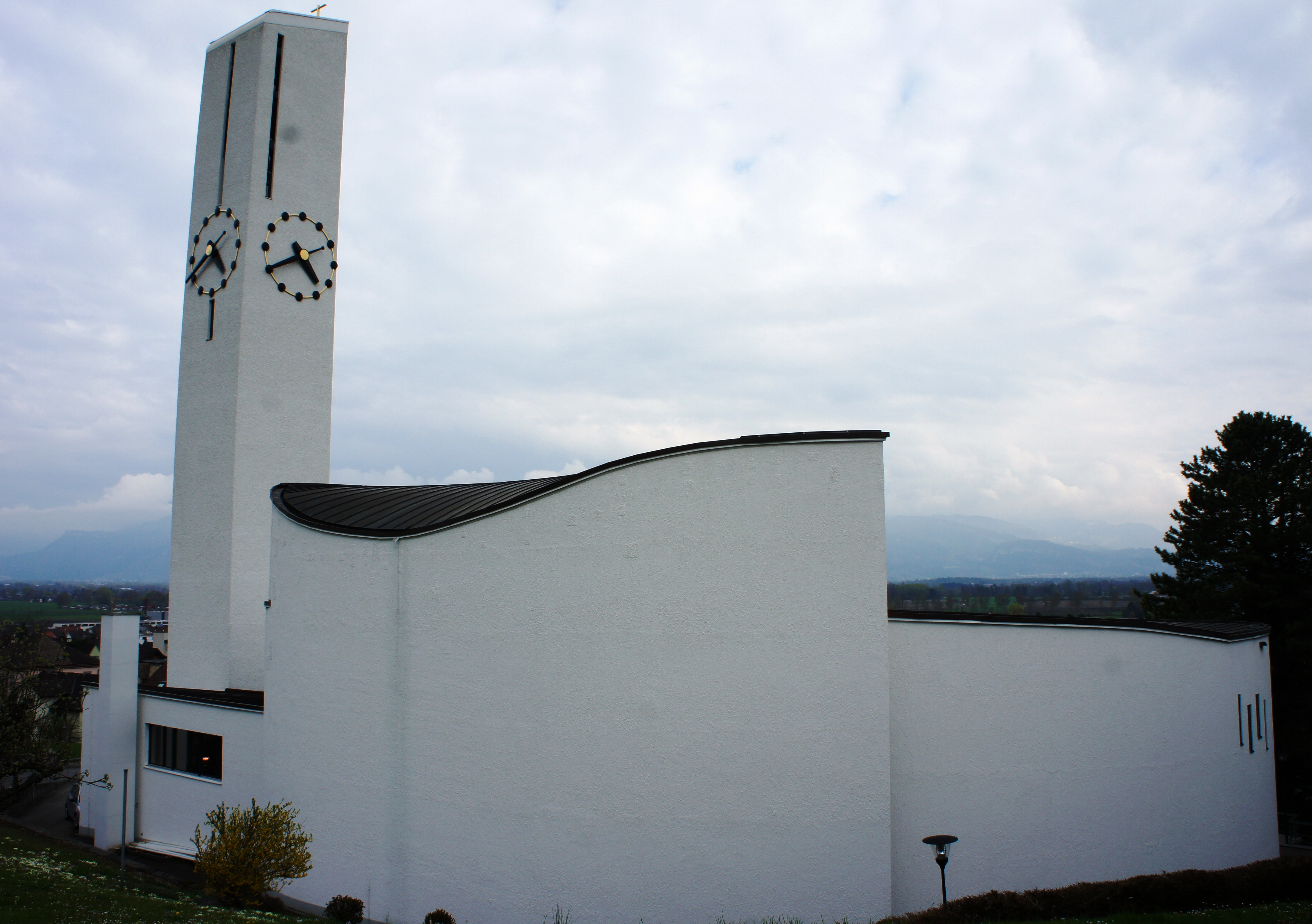 Blick aus Nordwesten auf die kath. Kirche Rebstein.